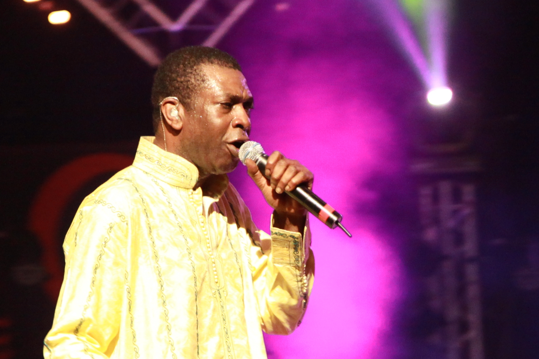 Youssou N'Dour en concert au festival de Cornouaille de Quimper le 25 juillet 2010 à l'espace Gradlon.